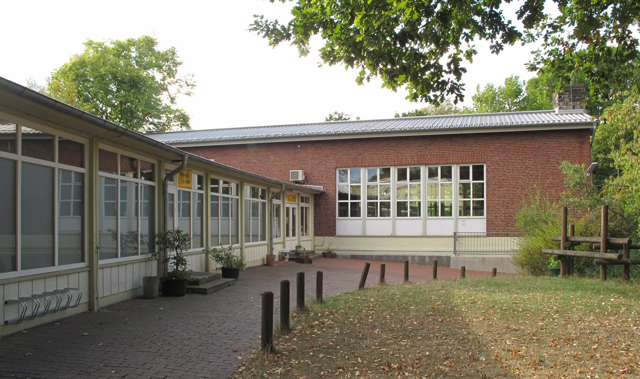 Jugendheim Walle in Bremen, Waller Heerstraße 229Das abgebildete Objekt ist ein geschütztes Kulturdenkmal in der Freien Hansestadt Bremen, mit der Nr. 1195 beim Landesamt für Denkmalpflege registriert.